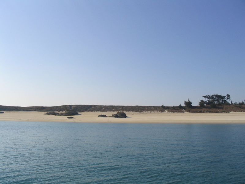 Plage sud, île des ebihens, côte d'armor, bretagne, france, europe. Mars 2005 au matin, temps clair, mer calme.